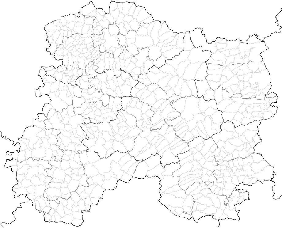 Carte des 620 communes de la Marne